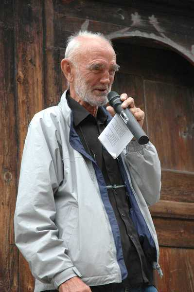 Forfatter Odd Børretzen; Kaffens dag 18.august 2005